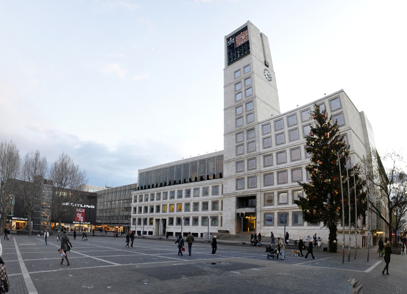 Gebiet Stuttgart-Mitte